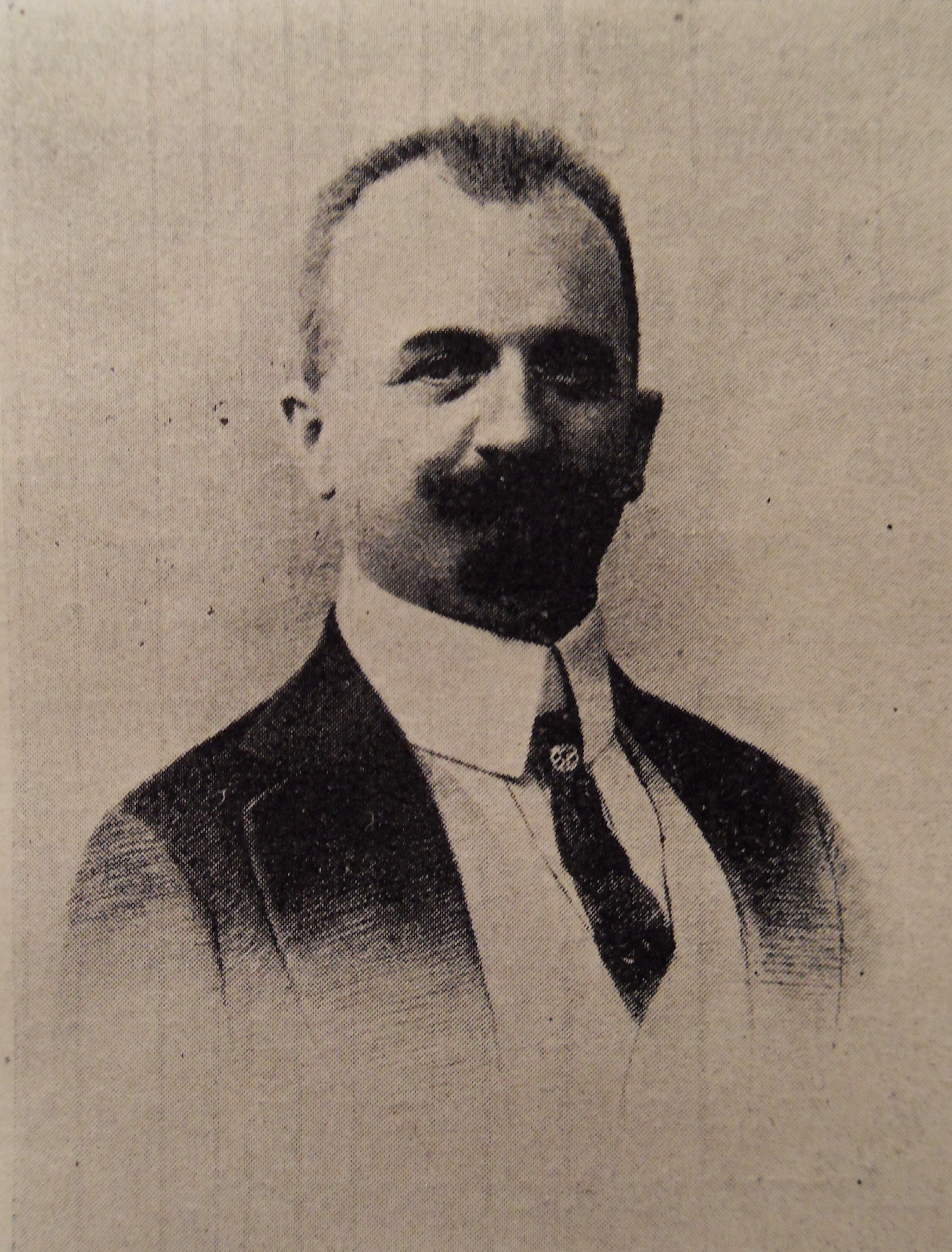 prof. Piotr Bieńkowski